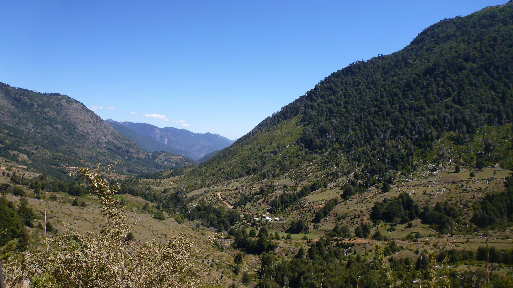 Fotografía en Movimiento. Vista en descenso de la Reserva Nacional China Muerta, ubicada en la comuna de Lonquimay, Región de la Araucanía.